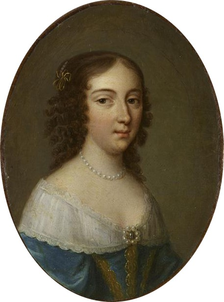 Exécuté vers 1775-1776 pour le cabinet de travail des petits appartements du palais Bourbon, demeure des Condé ; envoyé à Chantilly avant 1846 ; probablement d'après une gravure éditée chez Daret en 1653